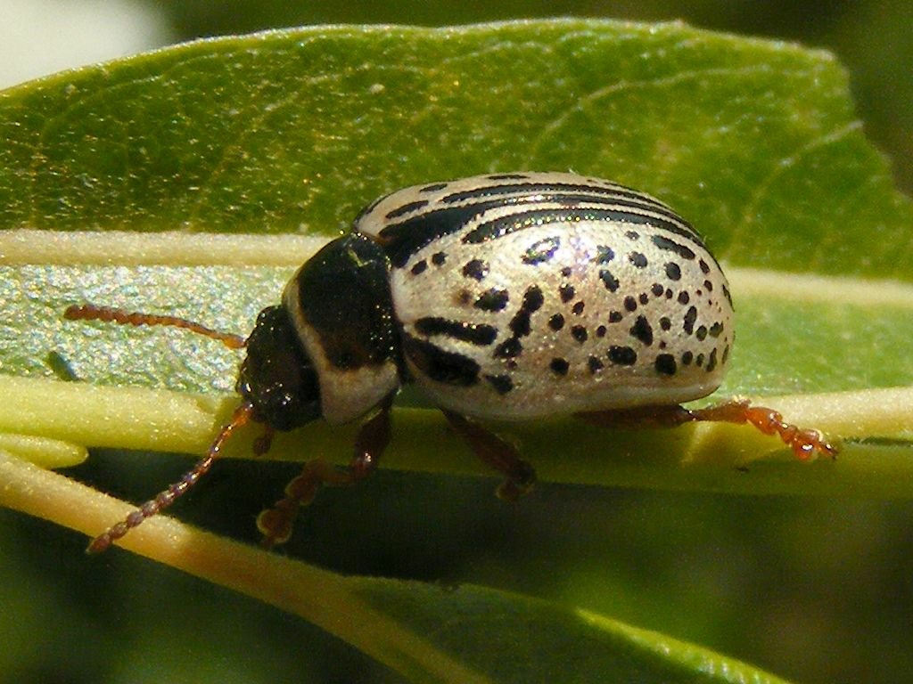 Calligrapha multipunctata